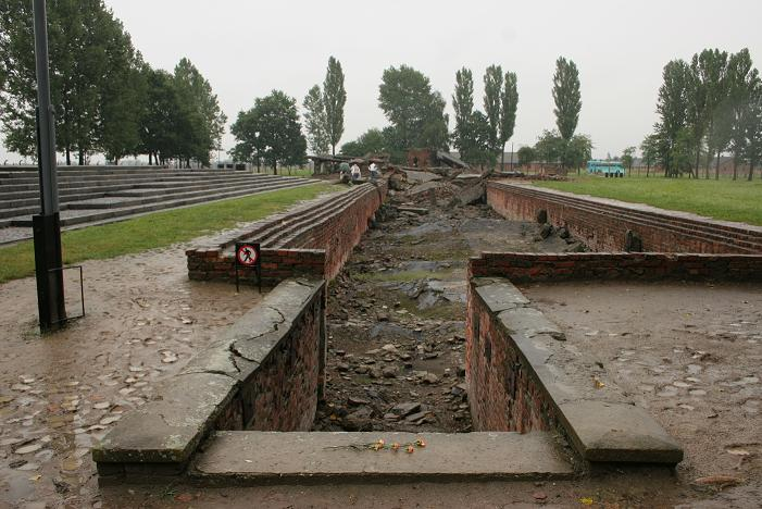 Overblijfselen van een van de gaskamers, voor ziet u de entree met omkleedcambine, rechtdoor aan het eind is de daadwerkelijke gaskamer